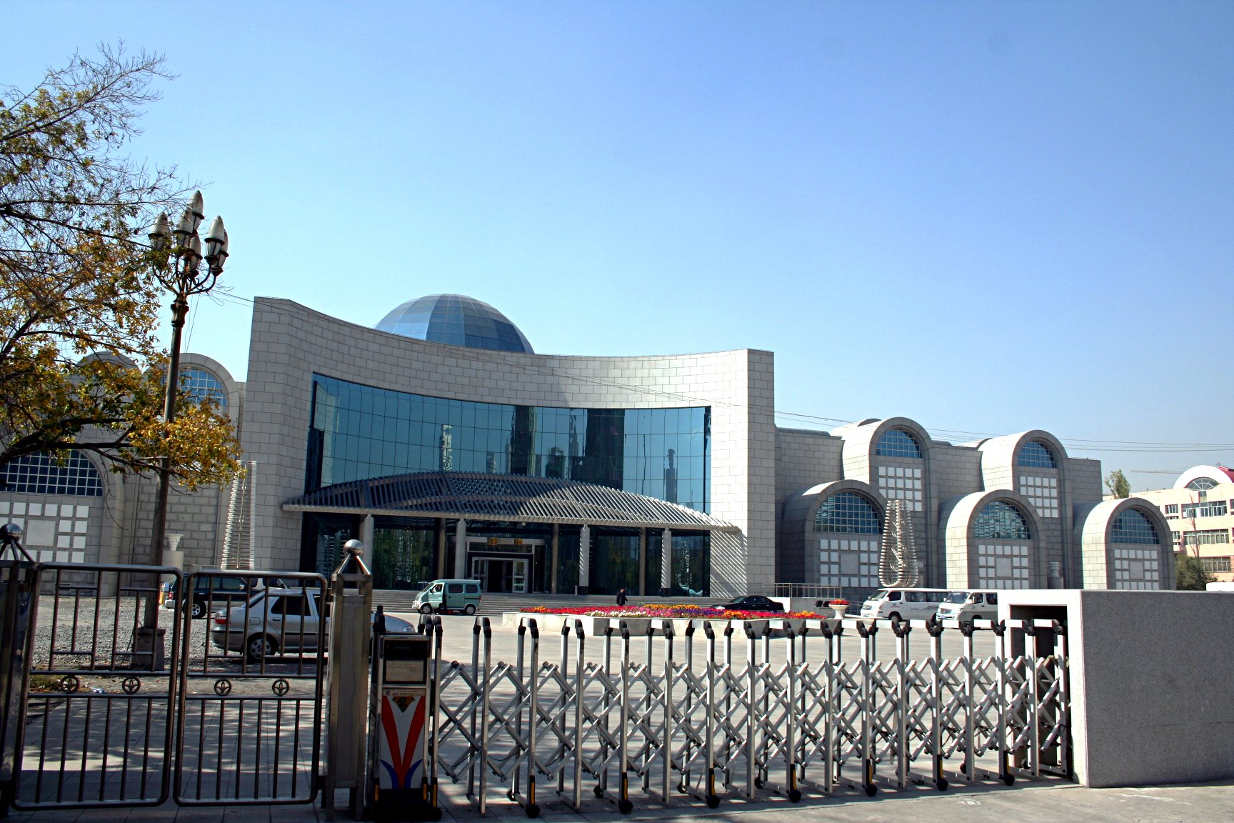 Xinjiang Museum in Urumqi, Xinjiang, China